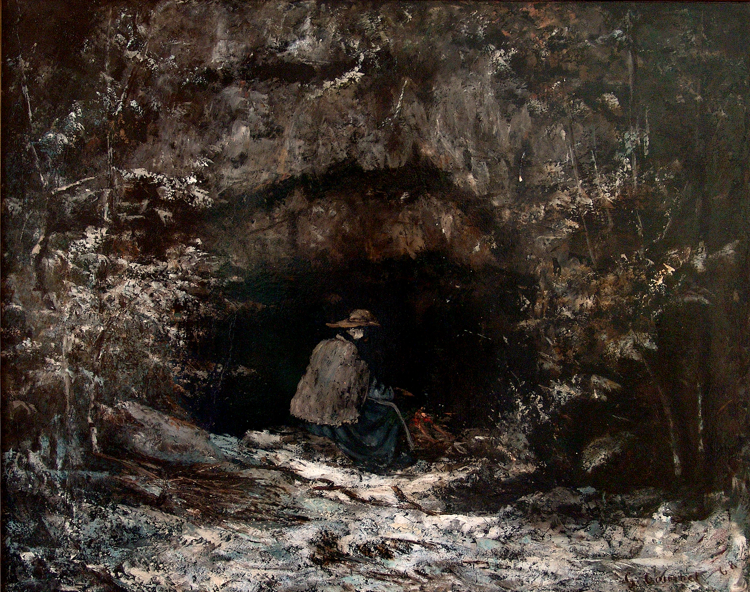 L'Hiver, Gustave Courbet, 1868, huile sur toile, 61x88cm